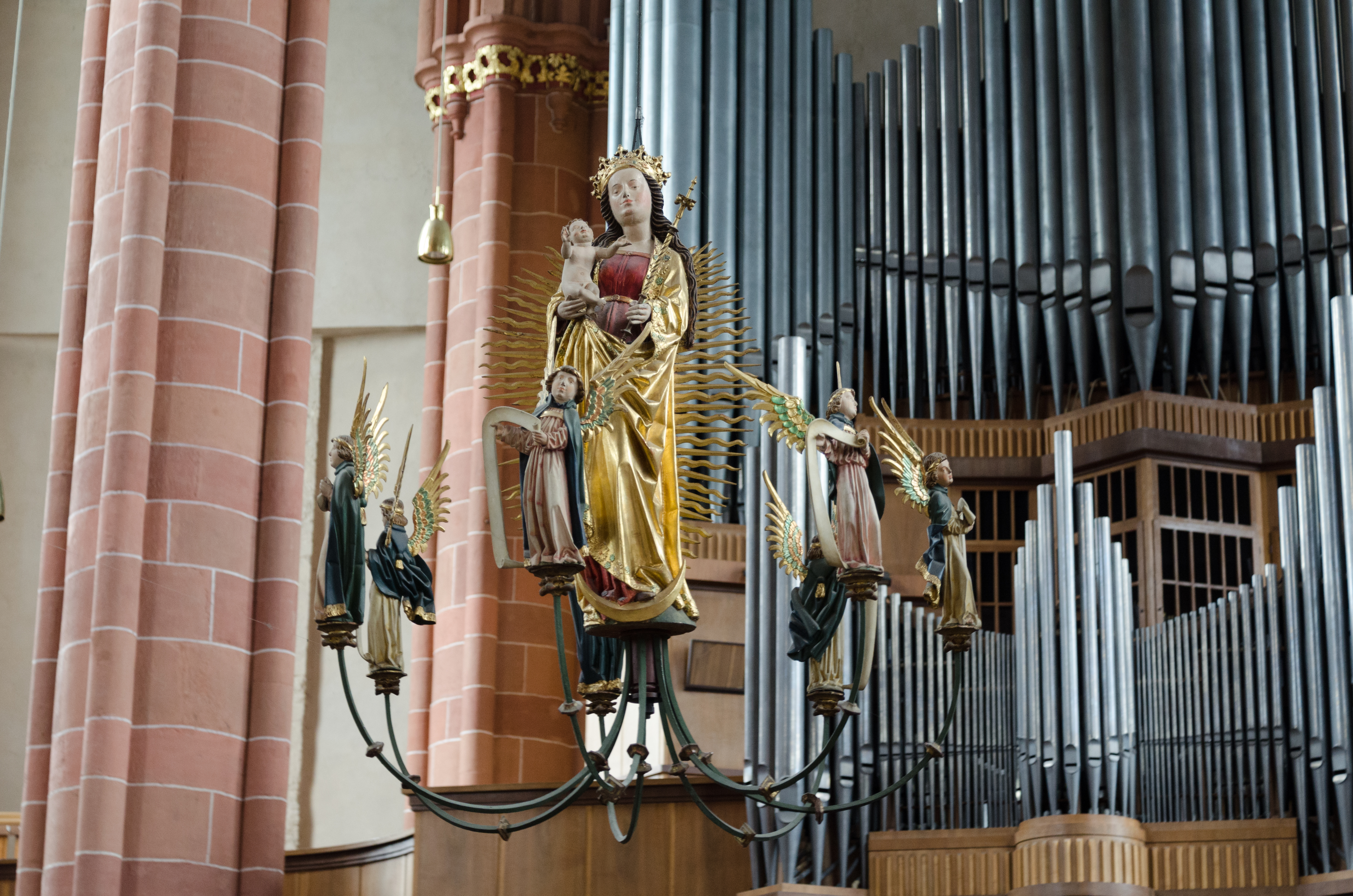 Wetzlarer Dom